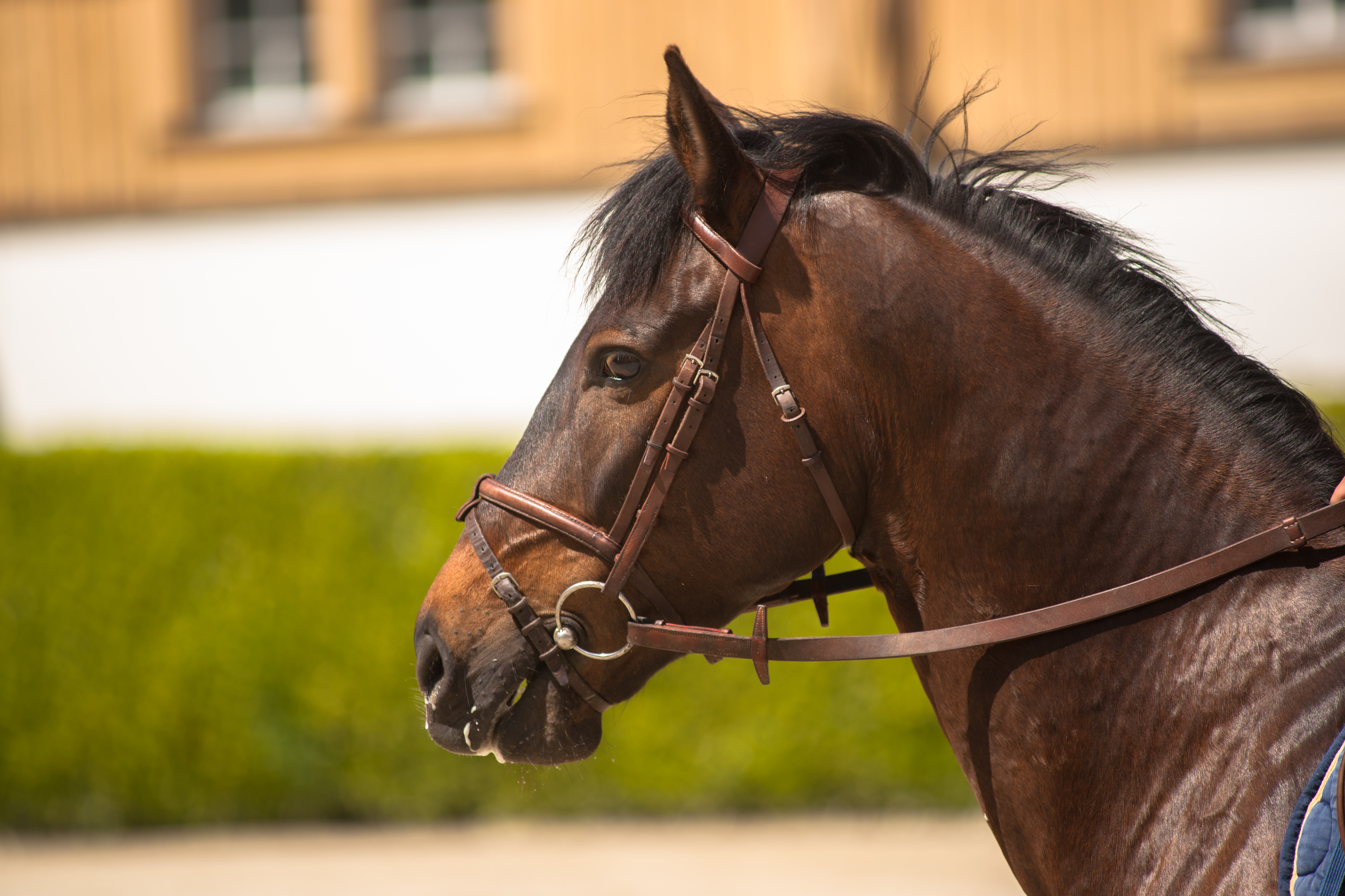 Haras national Avenches - Franches montagnes